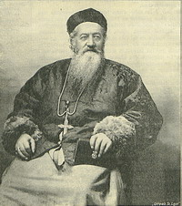 Félix Biet M.E.P. (1838-1901), vicaire apostolique du Thibet (Lhassa) en Chine, et naturaliste.